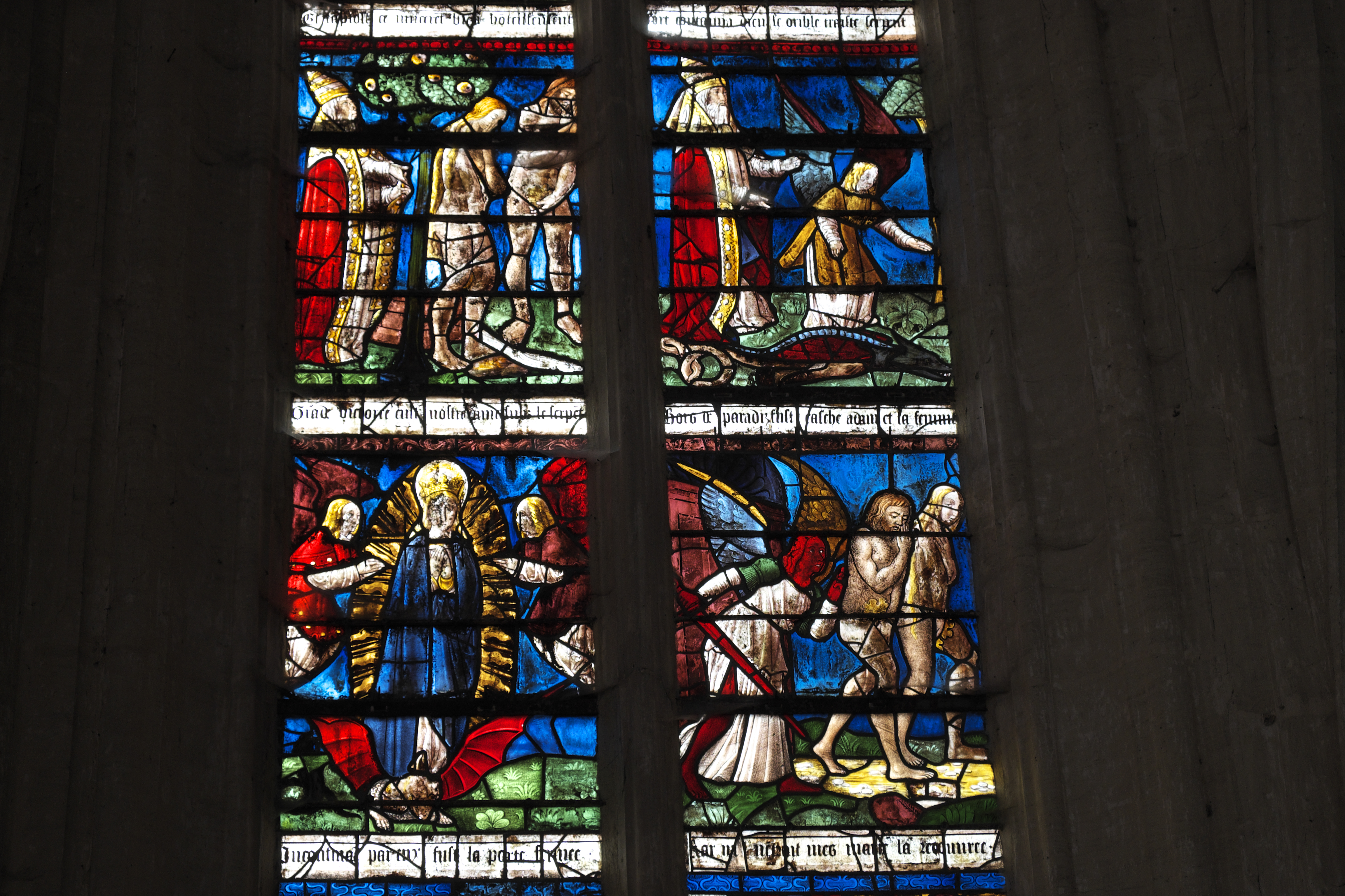 Katholische Kirche Saint-Remi in Ceffonds im Département Haute-Marne (Champagne-Ardenne/Frankreich), Bleiglasfenster (baie 4), von 1511; Darstellung: Erschaffung von Adam und Eva, Sündenfall; Ausschnitt: Vertreibung aus dem Paradies, Maria im Strahlenkranz .